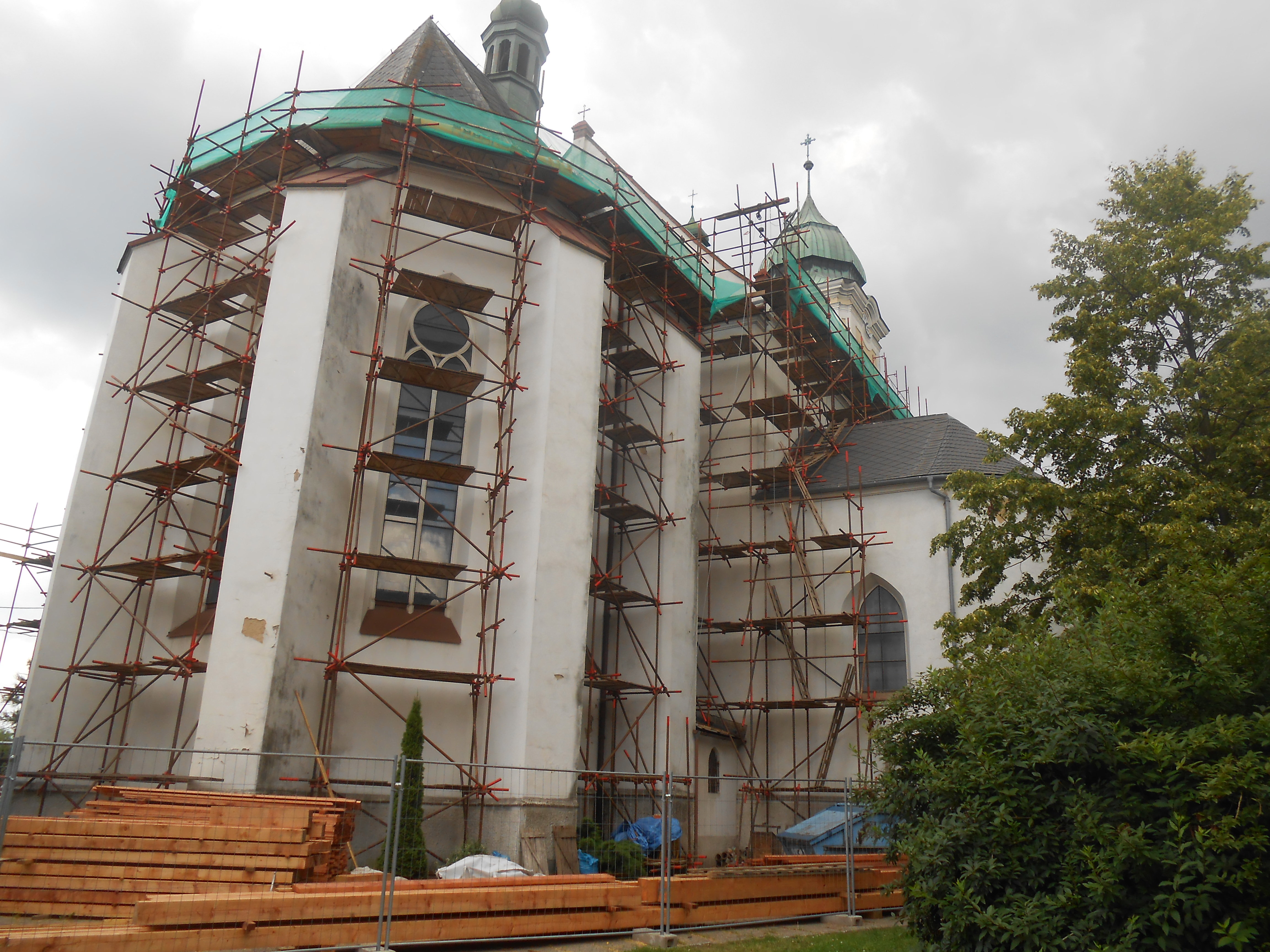 Hlučín, kostel sv.Jana Křtitele, kulturní památka, oprava střechy